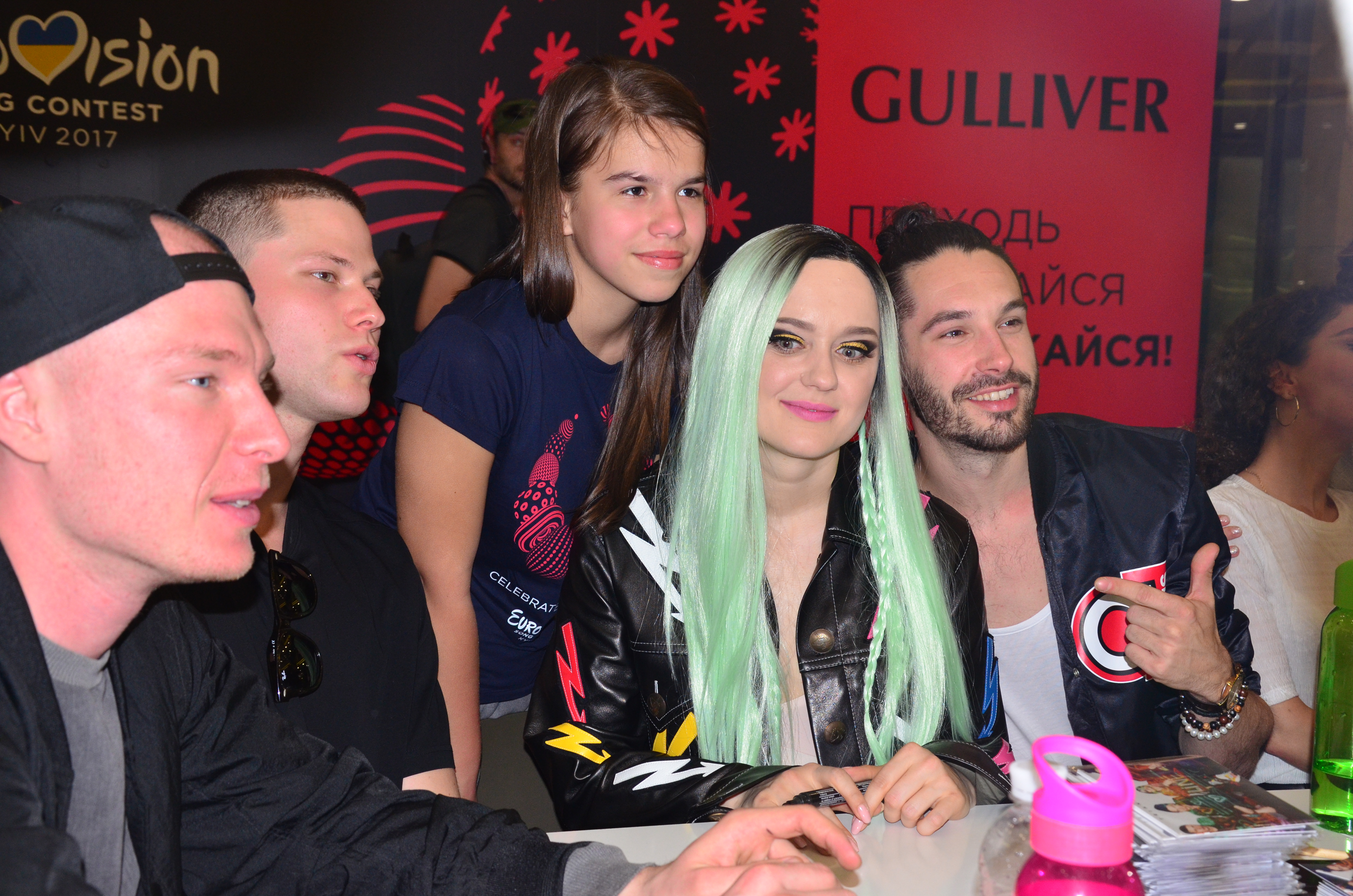 Triana Park, автограф сесія ТЦ Гулівер. Київ.